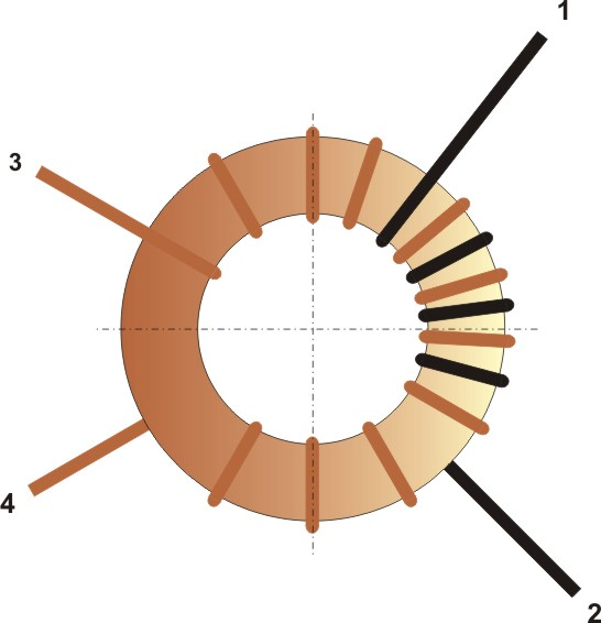 Ringkernwickeltechnik 1